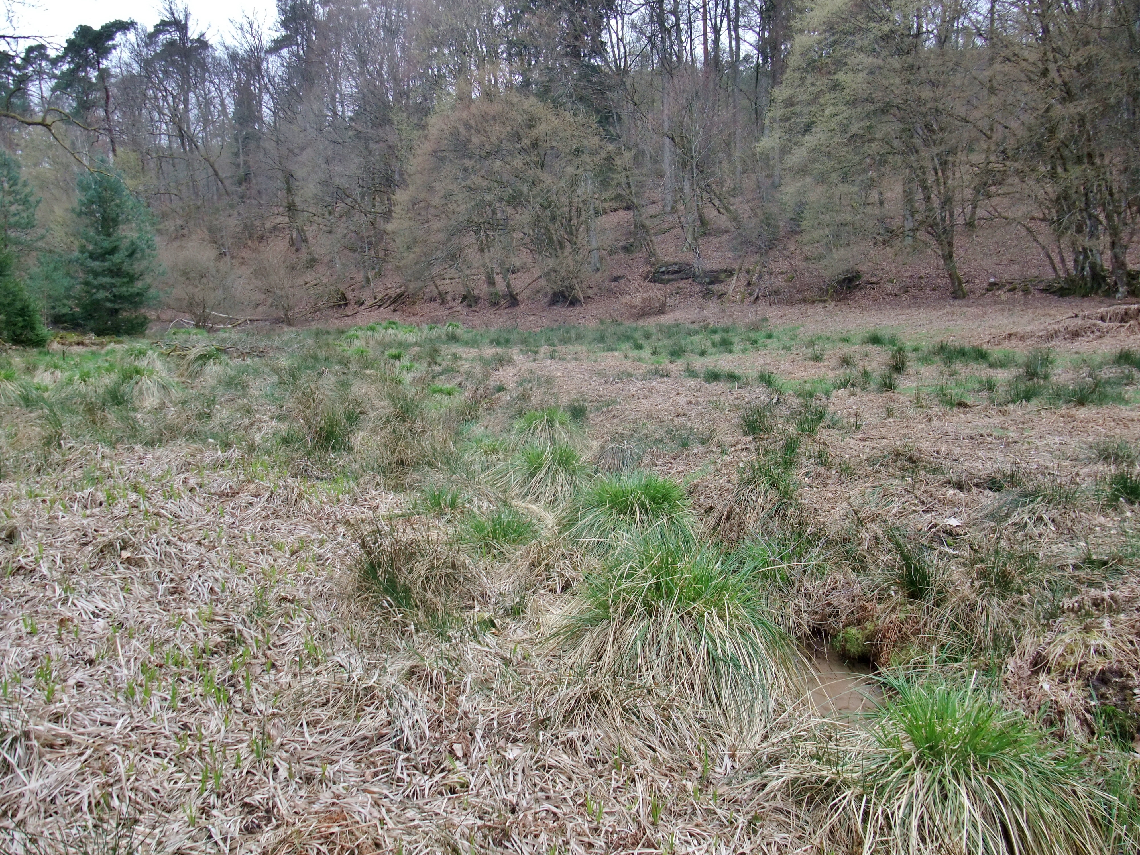 Carex paniculata